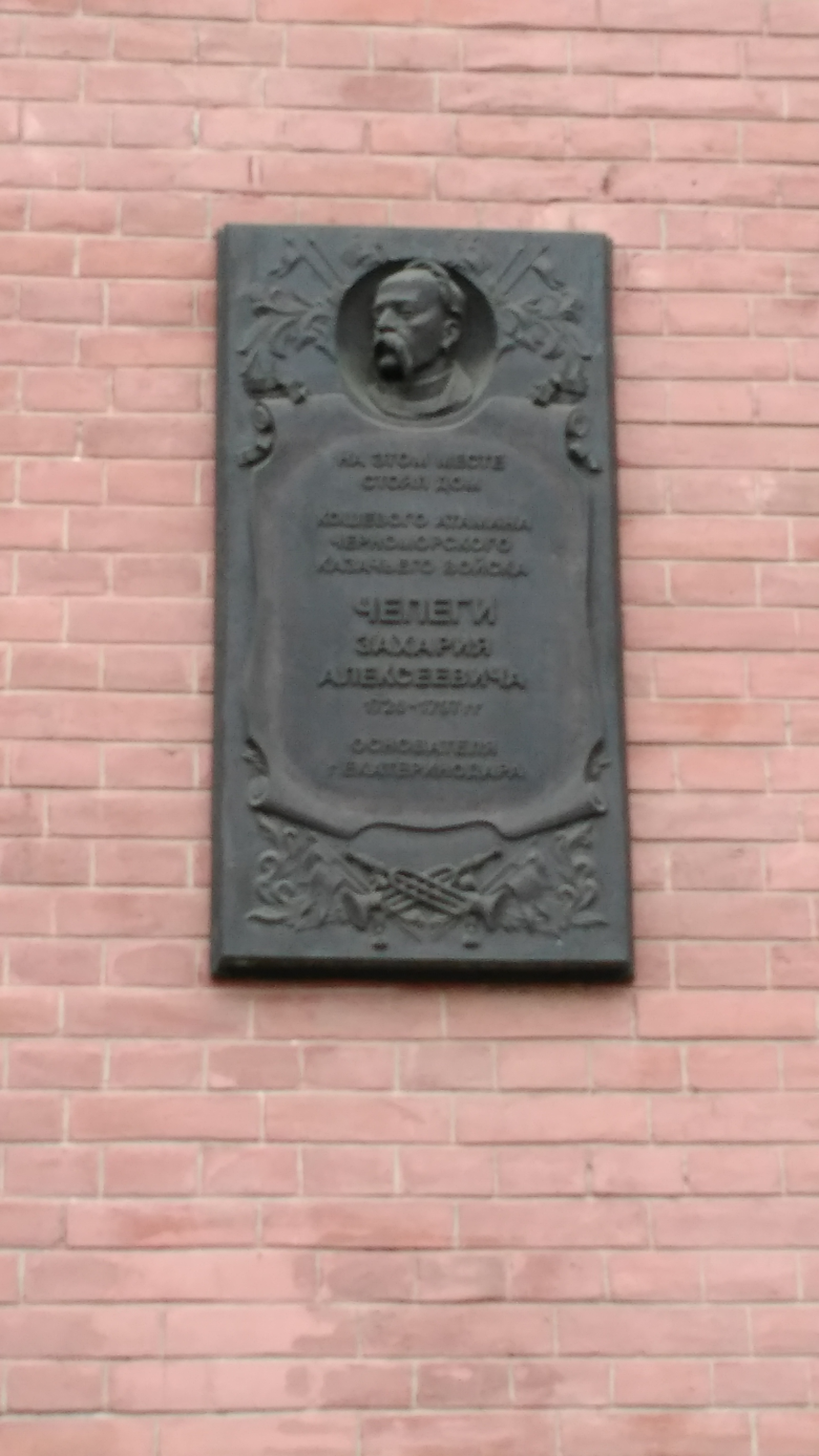 Мемориальная доска основателю Краснодарв Чепиге Х. А. по ул Красная в Краснодаре. 2017.